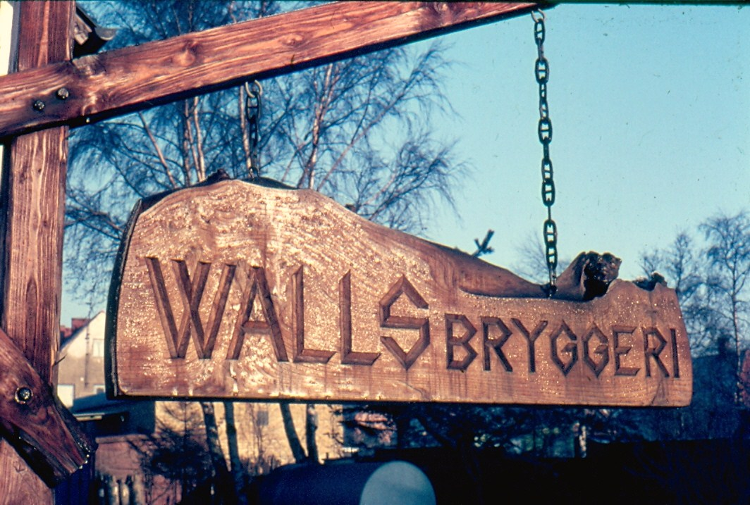 Entré Walls Bryggeri